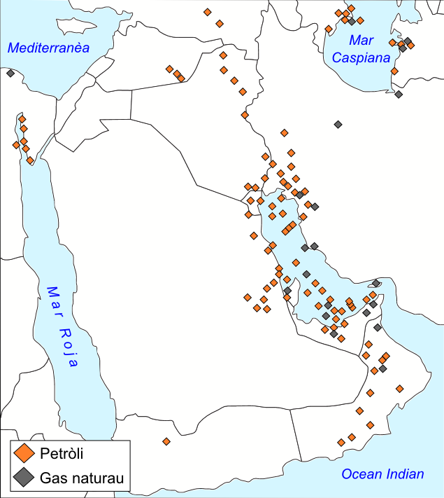 Camps principaus d'idrocarbur de l'Orient Mejan.